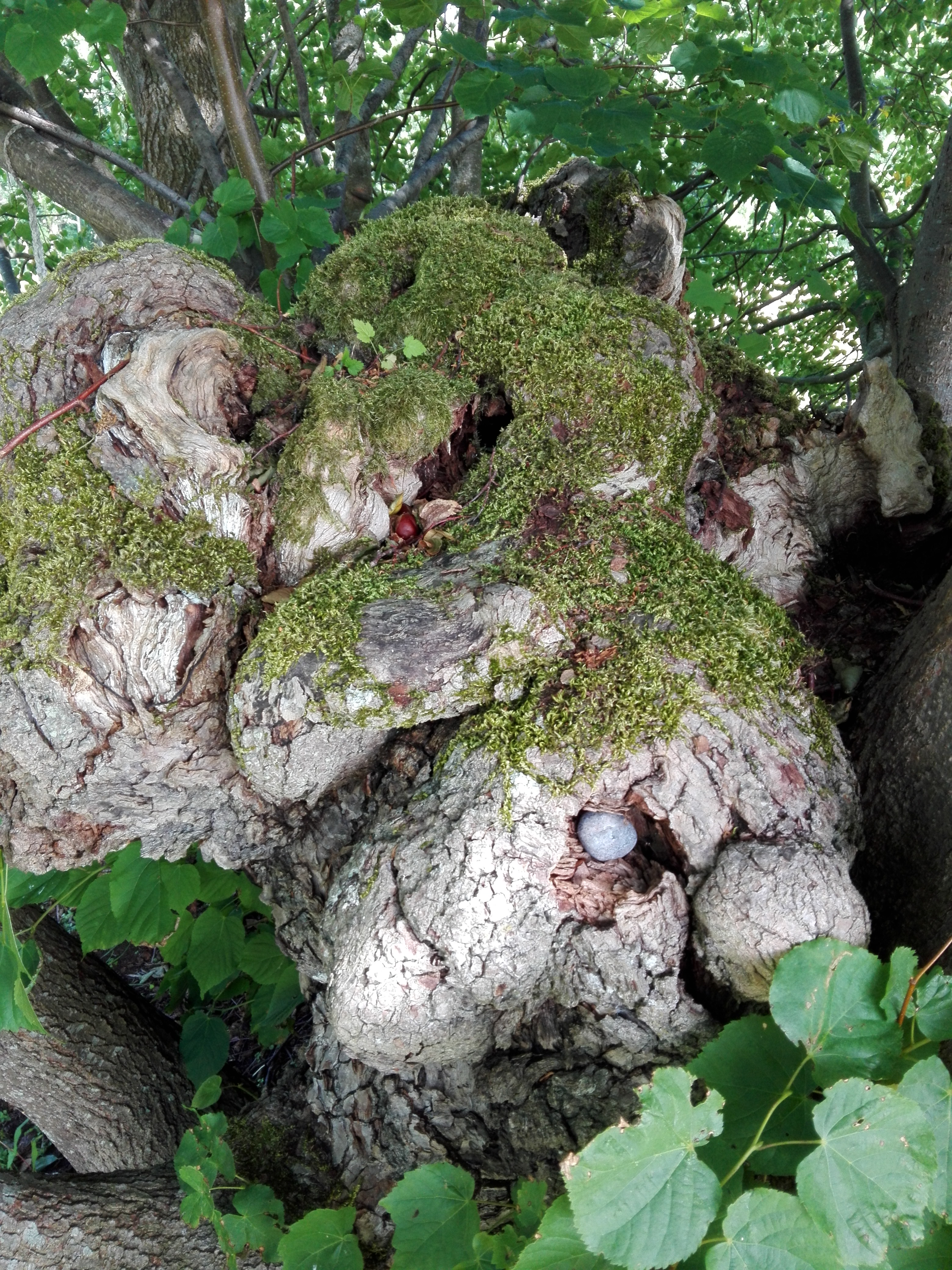 Ülendi ohvripärn Hiiumaal Ülendi külas